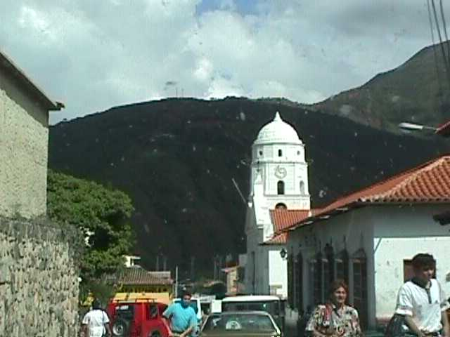 Catedral de Trujillo, estado Trujillo - Venezuela (1999)